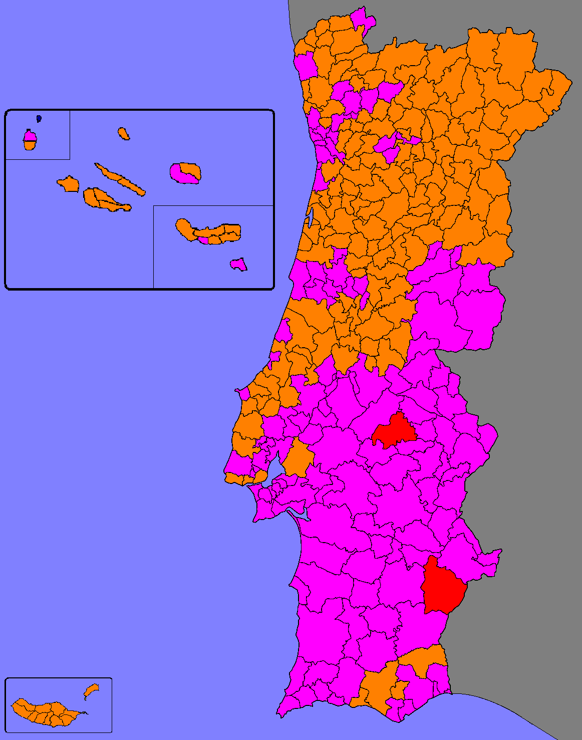 Mapa ilustrativo do partido mais votado por concelho nas eleições